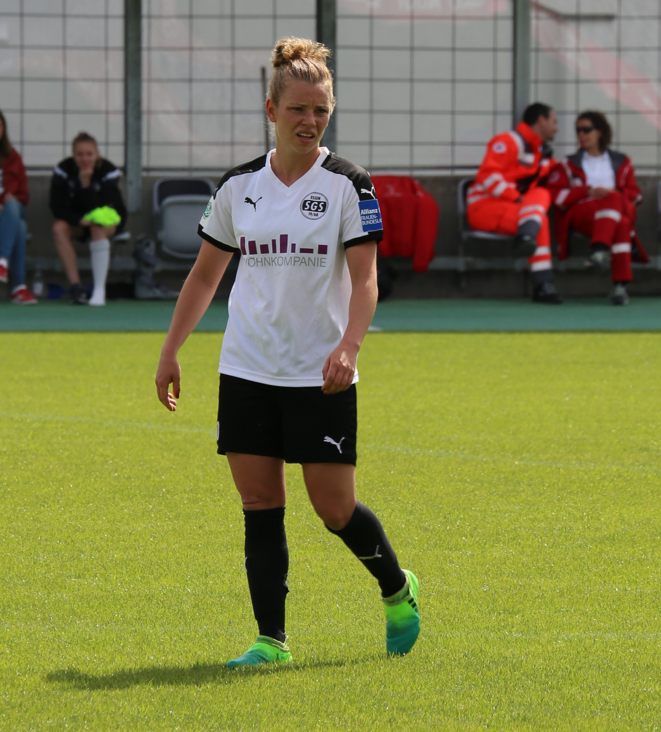 Linda Dallmann (SGS Essen) beim Frauen-Bundesliga-Spiel FC Bayern München gegen SGS Essen am 21. Mai 2017 im Stadion an der Grünwalder Straße (Ergebnis war 2:0)